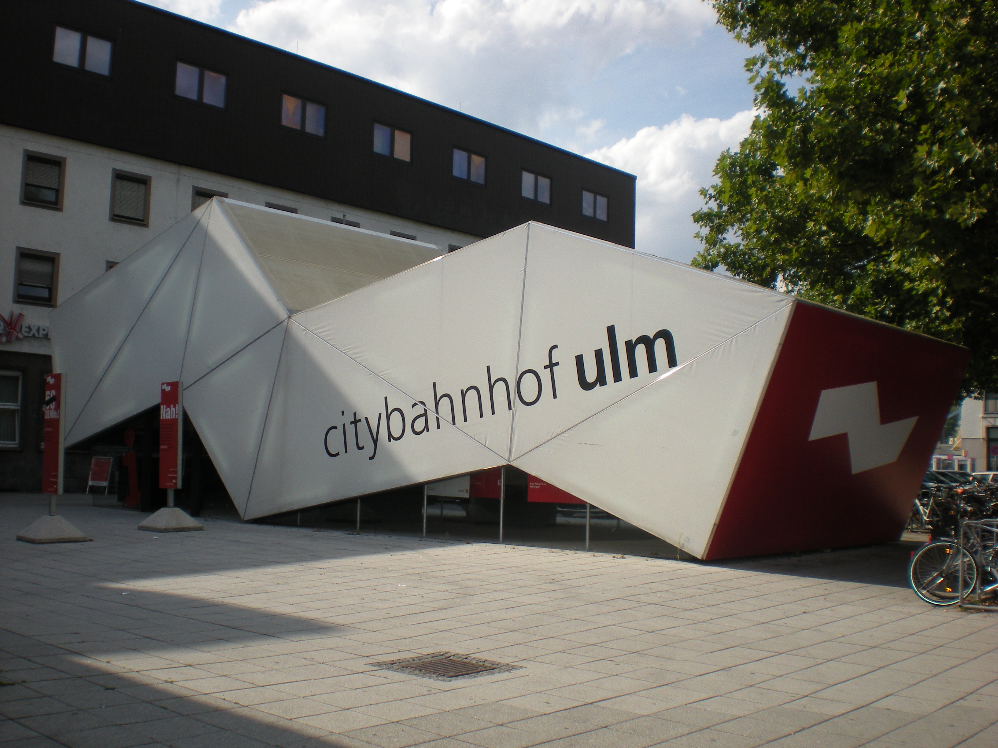 Informations-Pavillon zum Citybahnhof Ulm vor dem Empfangsgebäude des Ulmer Hauptbahnhofs